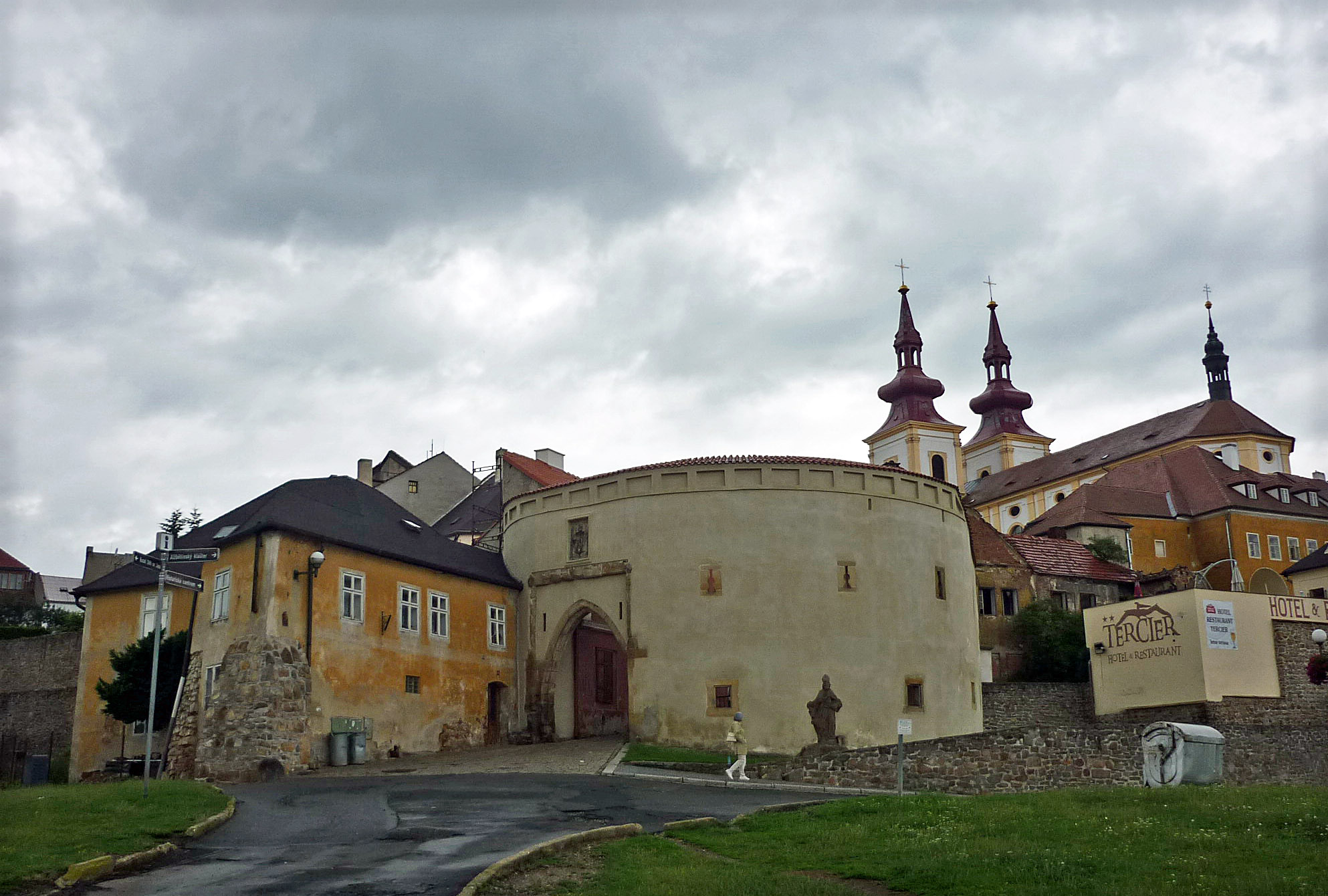 Saazer Tor (mit Barbakan) in Kaaden